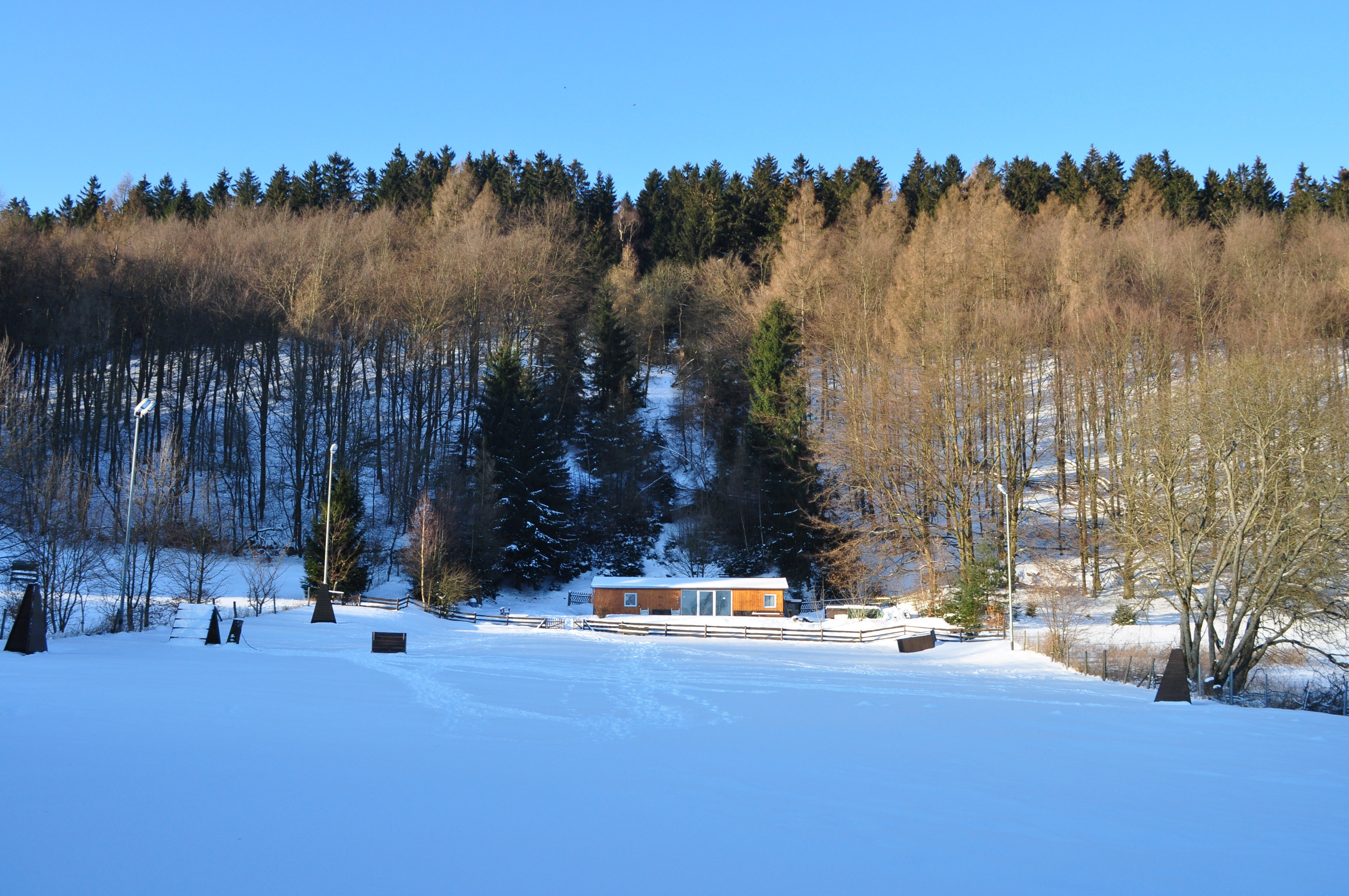 Anlage des Schäferhundevereins Niederreifenberg. An dieser Stelle befand sich bis 1971 die Skischanze an Weilsberg. Die Schneise ist anhand der abweichenden Bepflanzung heute noch zu erkennen.